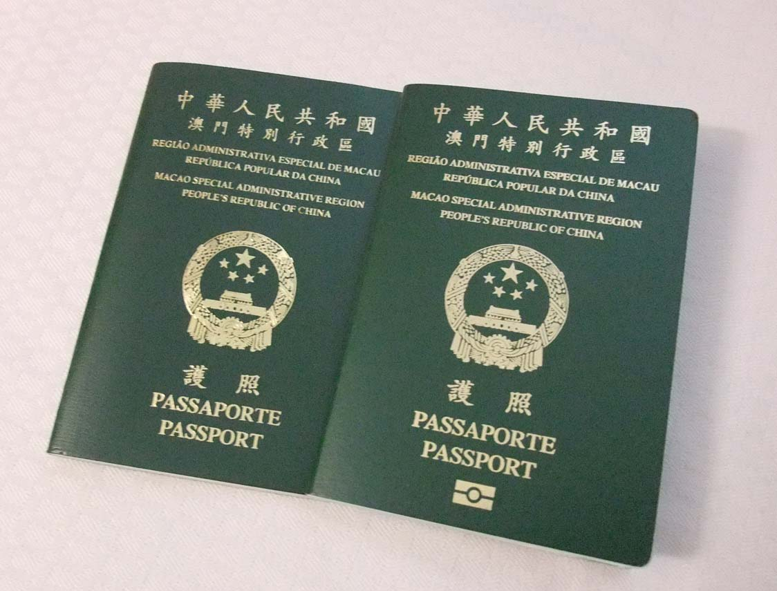 中文（香港）: 2009年9月1日起簽發的新版澳門特區電子護照(右圖)